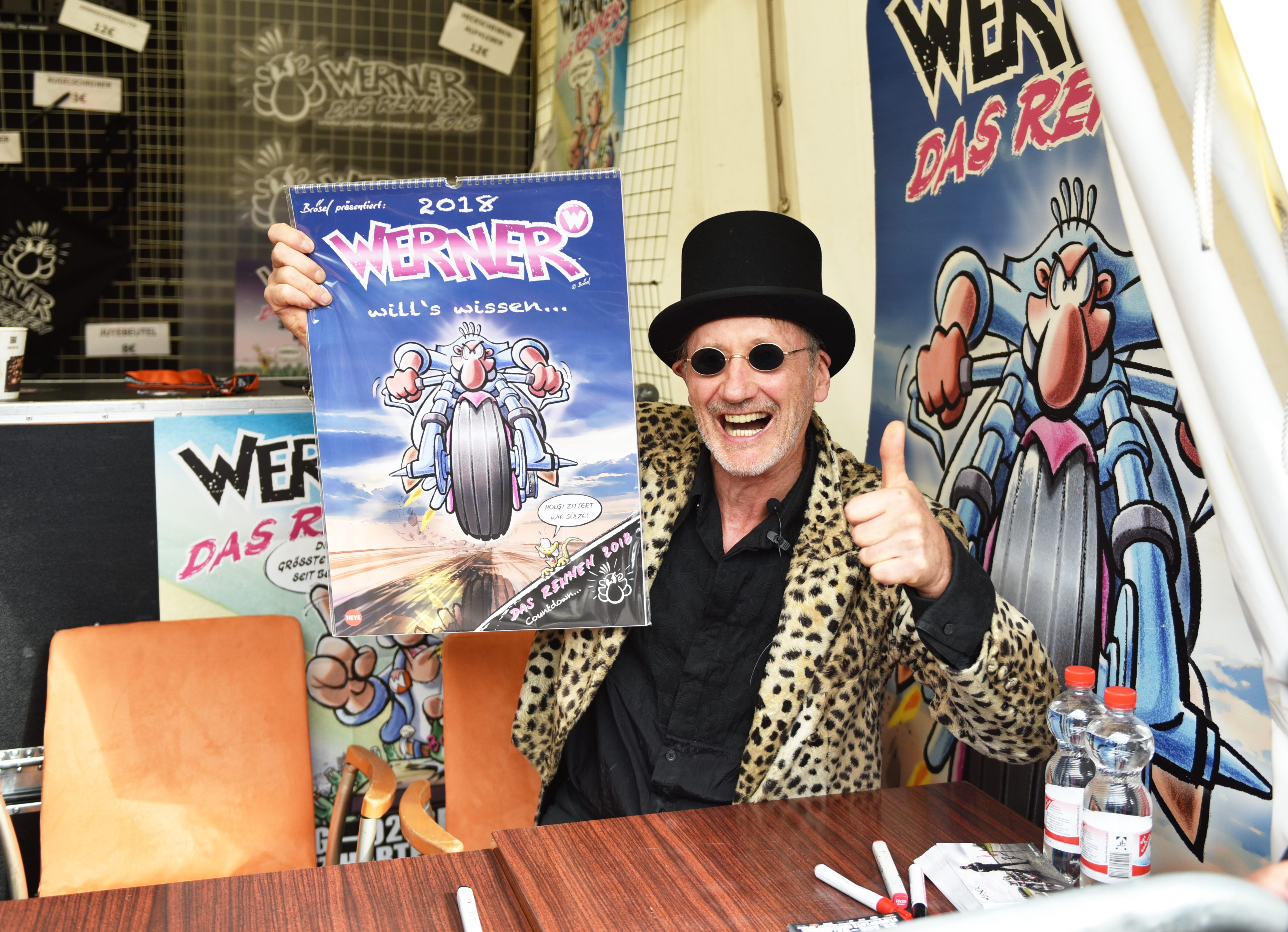 Brösel bei den Hamburg Harley Days 2017